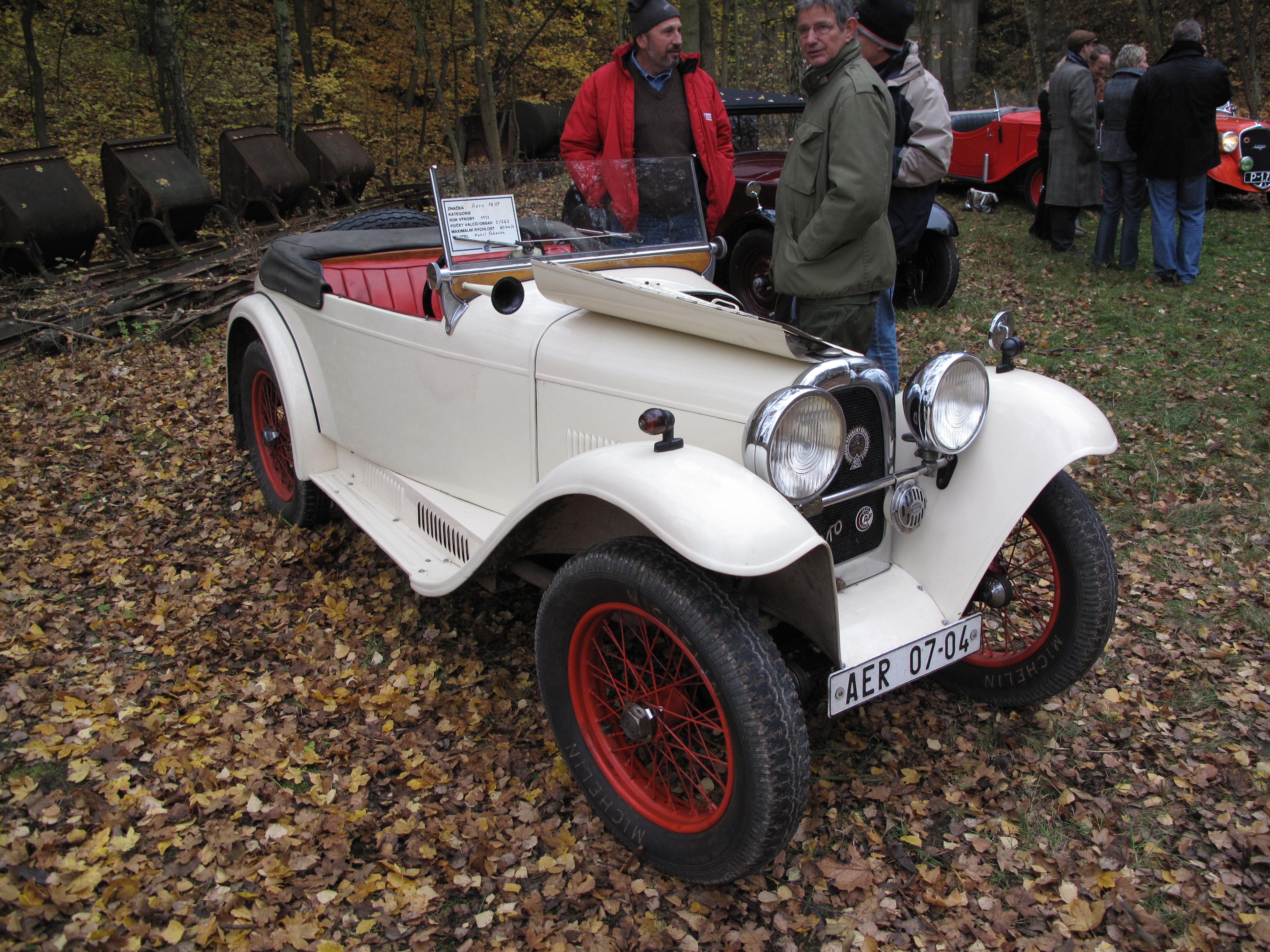 Solvayovy lomy